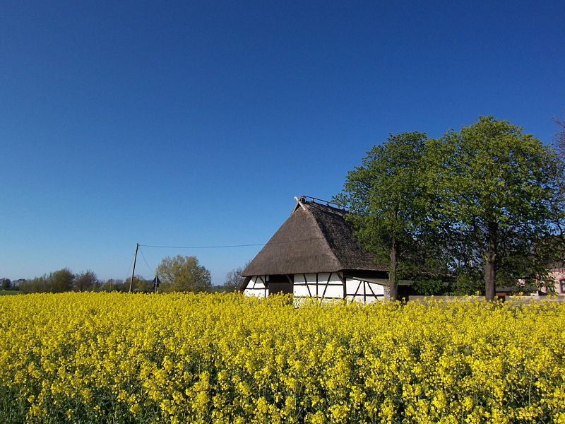 Rapsfeld und ehemalige Scheune (Hof Breide) in Allershagen, Gemeinde Lambrechtshagen